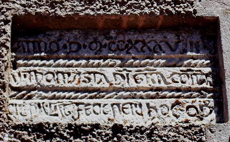 Epigrafe chiesa Selvena (GR), foto 13/07/2007